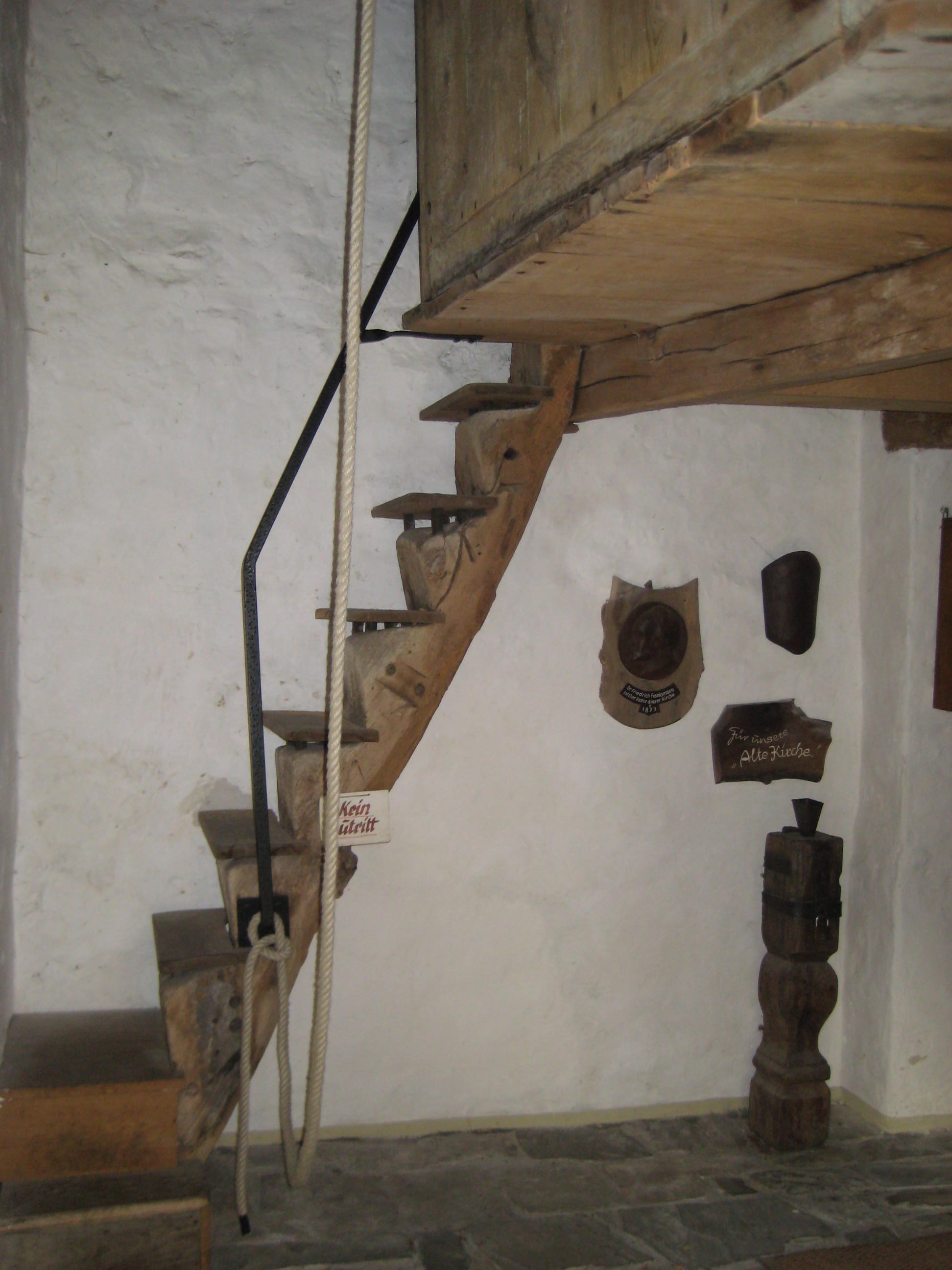 Alte St. Alexanderkirche in Wallenhorst, Baumtreppe